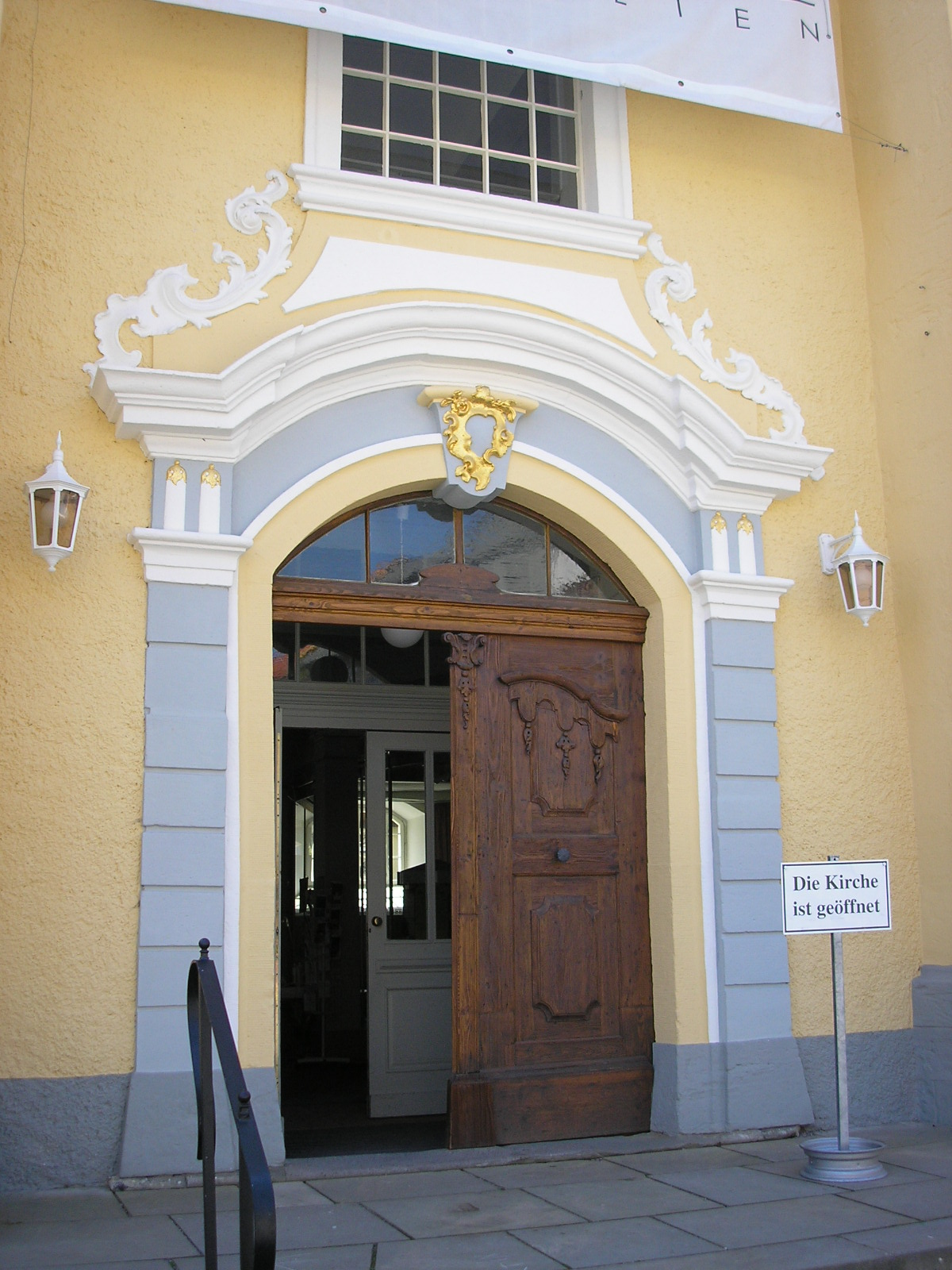 Nordportal der Stadtkirche "St. Jakobus" in Ilmenau (Thüringen).